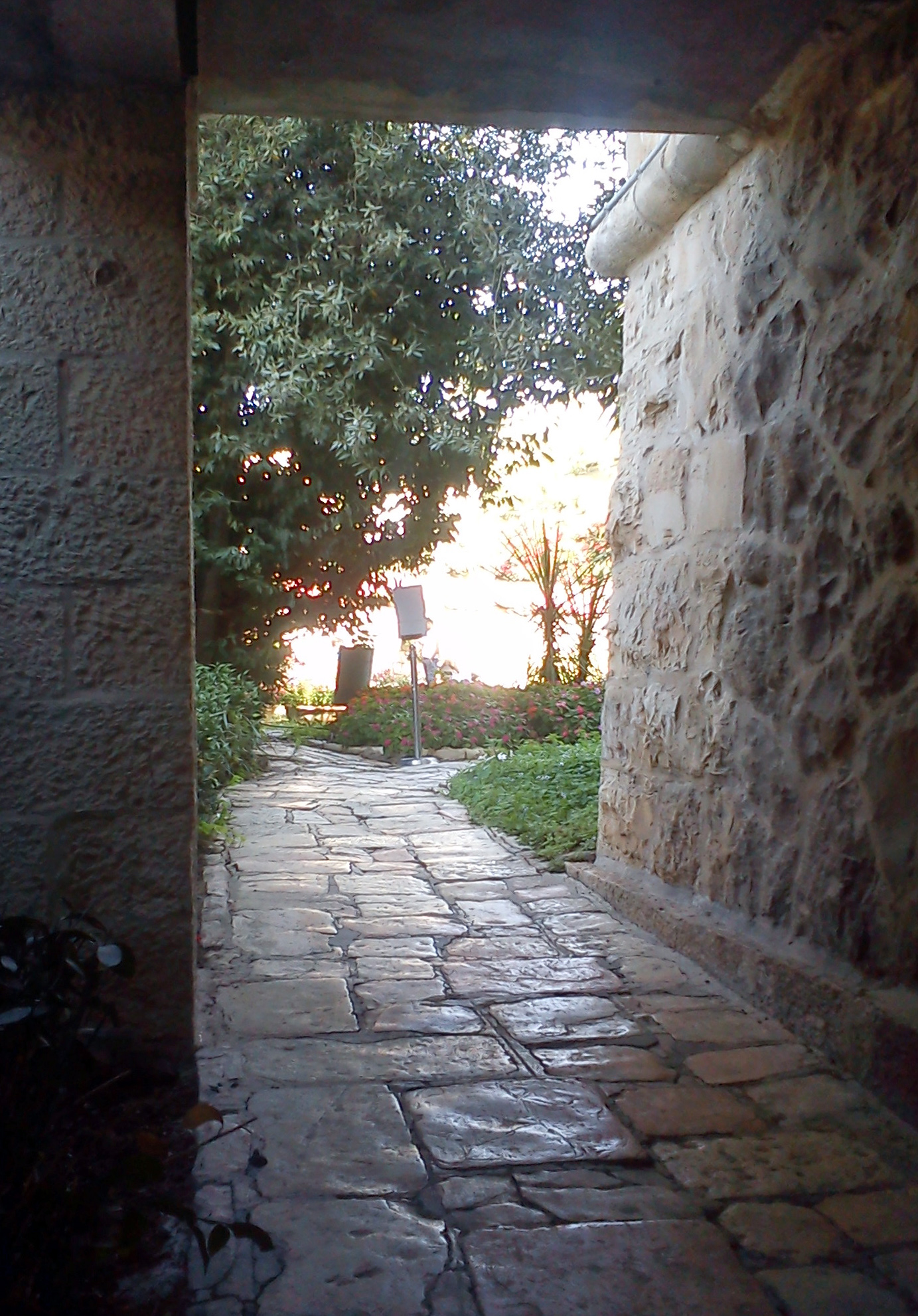 בית החולים מאיר רוטשילד הוא בית חולים יהודי מהראשונים שנוסדו בירושלים, ביוזמת הברון ג'יימס מאיר רוטשילד. ב-1888 עבר לרחוב הנביאים. ב-1918 החל לפעול במבנה בית החולים הדסה, ולאחר מכן פעלו בו מוסדות חינוך. מ-1970 משמש את מכללת הדסה. הבניין סימטרי, עם שני אגפים צדדיים נסוגים וכניסה מרכזית עם גרם מדרגות חיצוני.